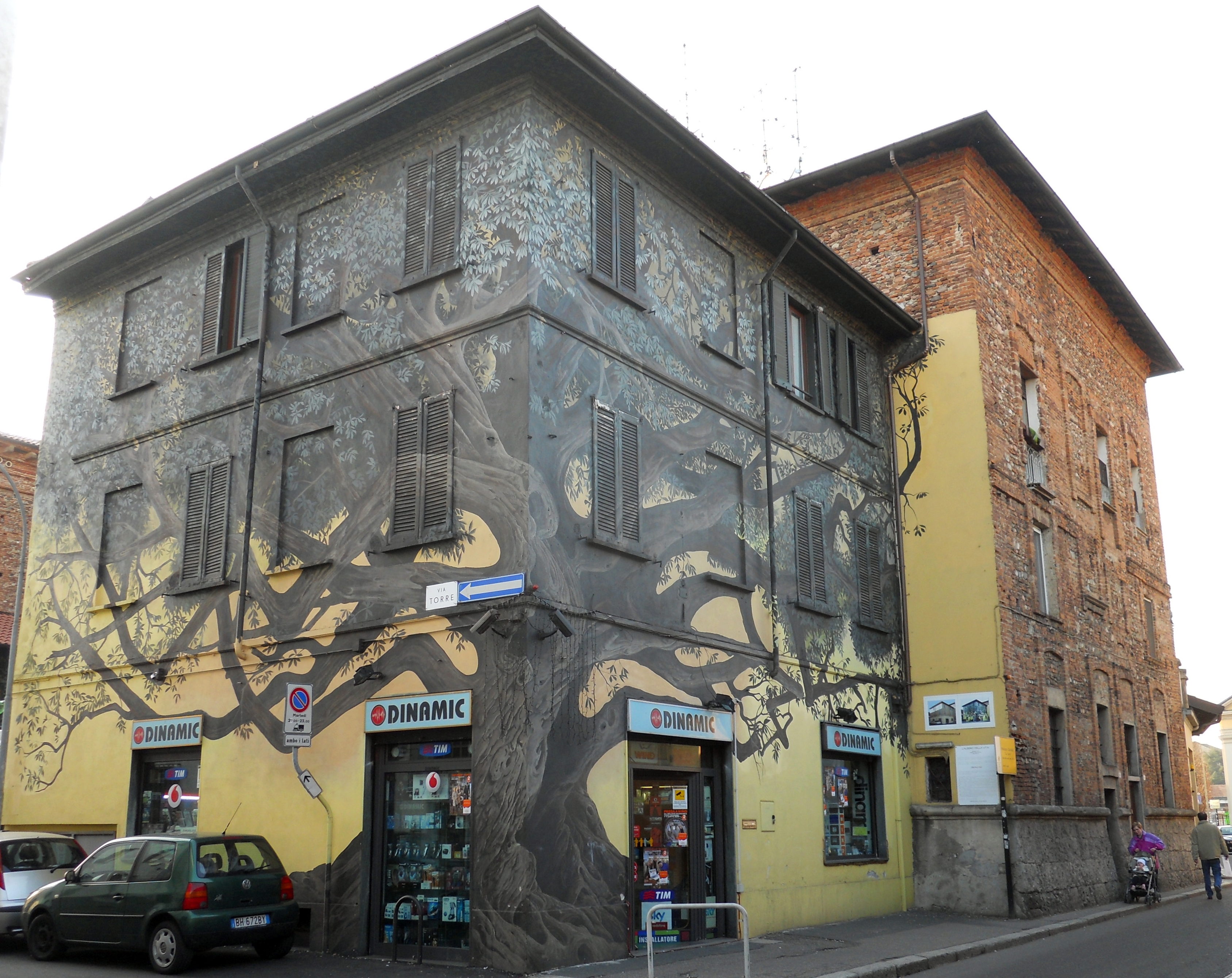 Parabiago. Palazzo Castelli "La Torre". L'albero della vita This is a photo of a monument which is part of cultural heritage of Italy.